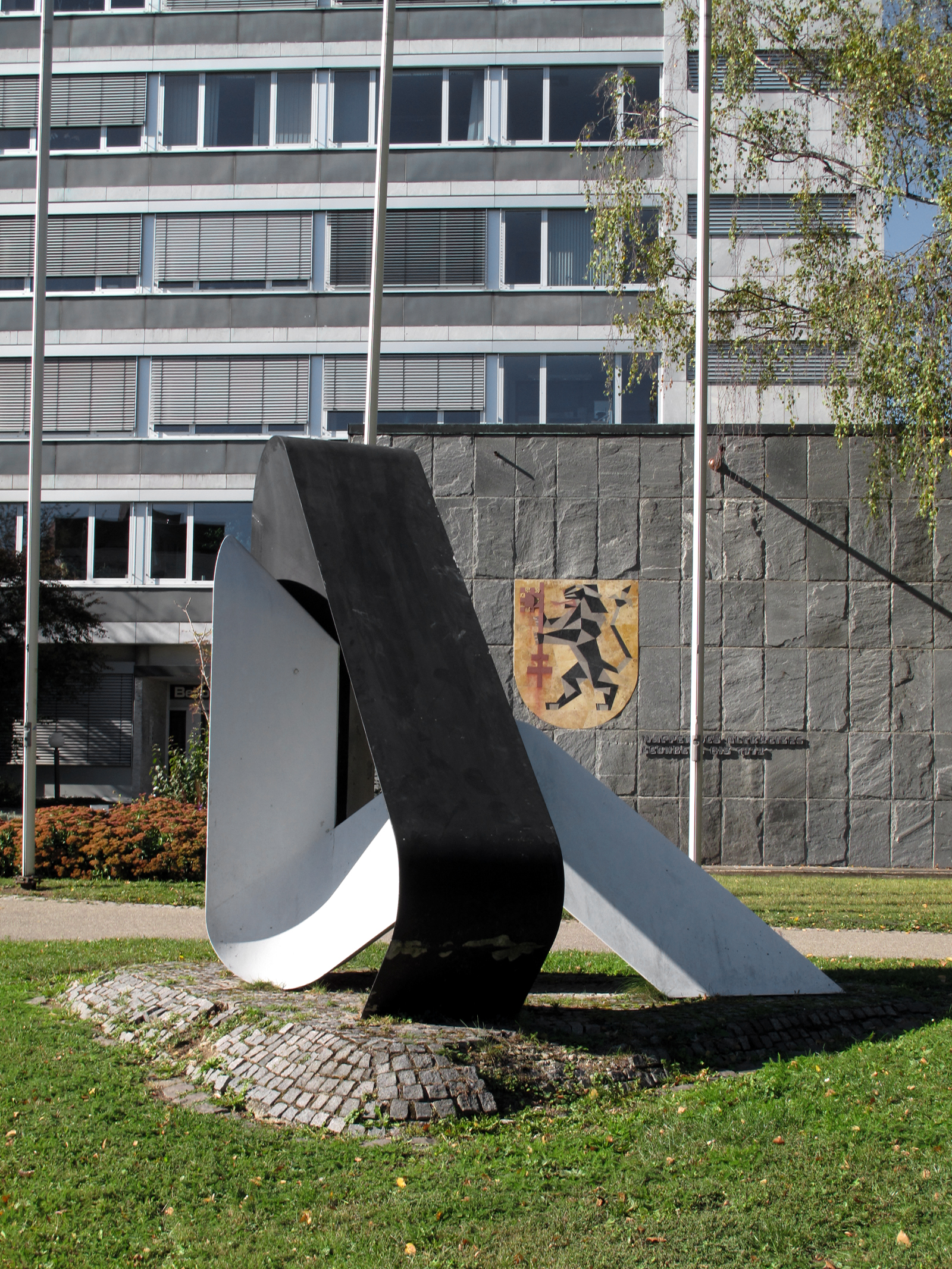 Horst Kuhnert, Großplastik, 1977, - Deutschland, Baden-Württemberg, Leonberg, vor dem Rathaus